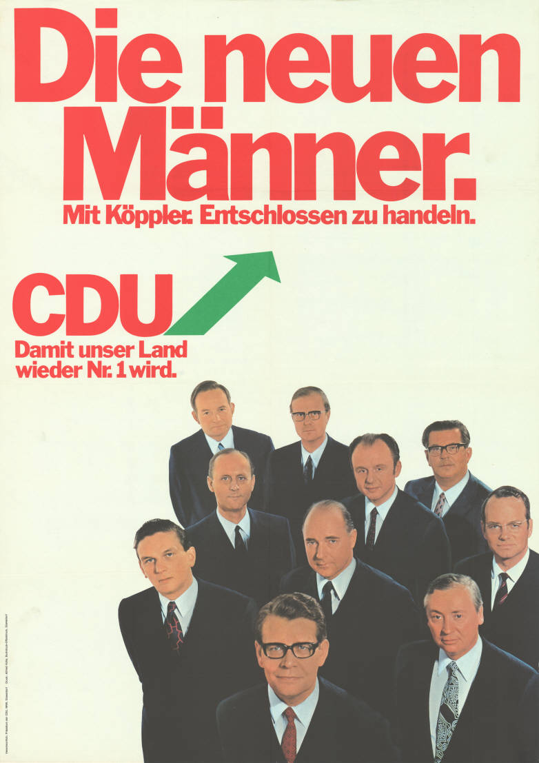 Die neuen Männer. Mit Köppler. Entschlossen zu handeln. CDU Damit unser Land wieder Nr.1 wird.Abbildung:GruppenfotoPlakatart:Kandidaten-/Personenplakat mit PorträtAuftraggeber:Verantw.: Präsidium der CDU, NRW, DüsseldorfDrucker_Druckart_Druckort:Alfried Holle, Buchdruck-Offsetdruck, DüsseldorfObjekt-Signatur:10-009 : 608Bestand:Landtagswahlplakate Nordrhein-Westfalen (10-009)GliederungBestand10-18:Landtagswahlplakate Nordrhein-Westfalen (10-009) » CDULizenz:KAS/ACDP 10-009 : 608 CC-BY-SA 3.0 DE